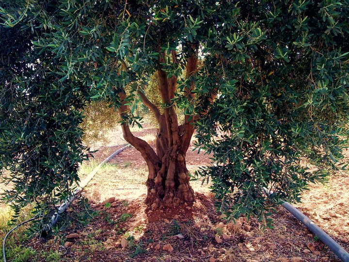 تل الناقة